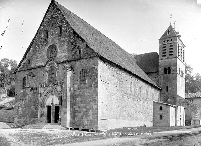 Église Saint-Theudère de Saint-Chef Mieusement